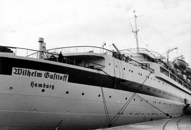 Das Lazarettschiff Wilhelm Gustloff im Osloer Hafen